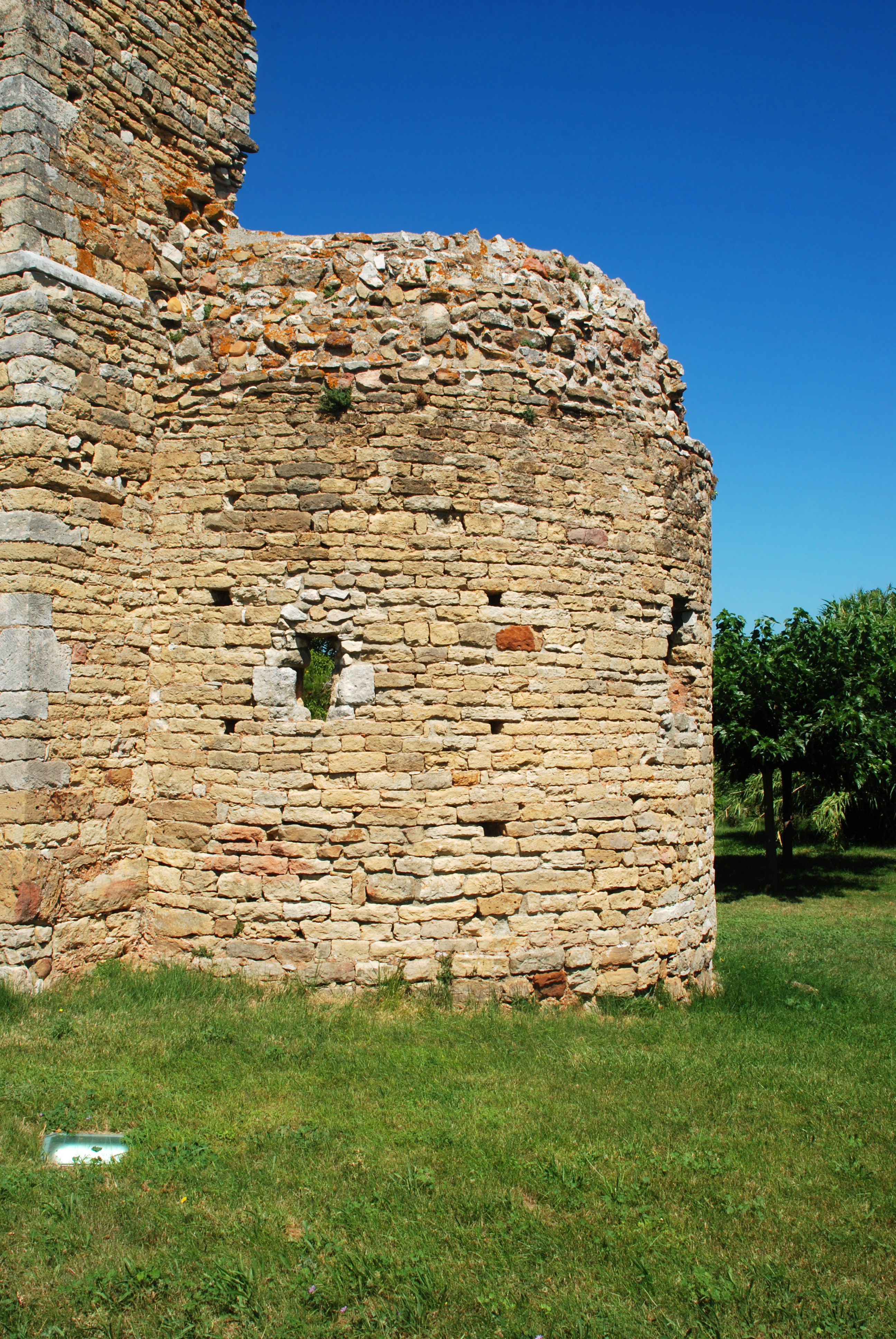 France - Gard - Chapelle Saint-Martin de Saint-Victor-la-Coste .